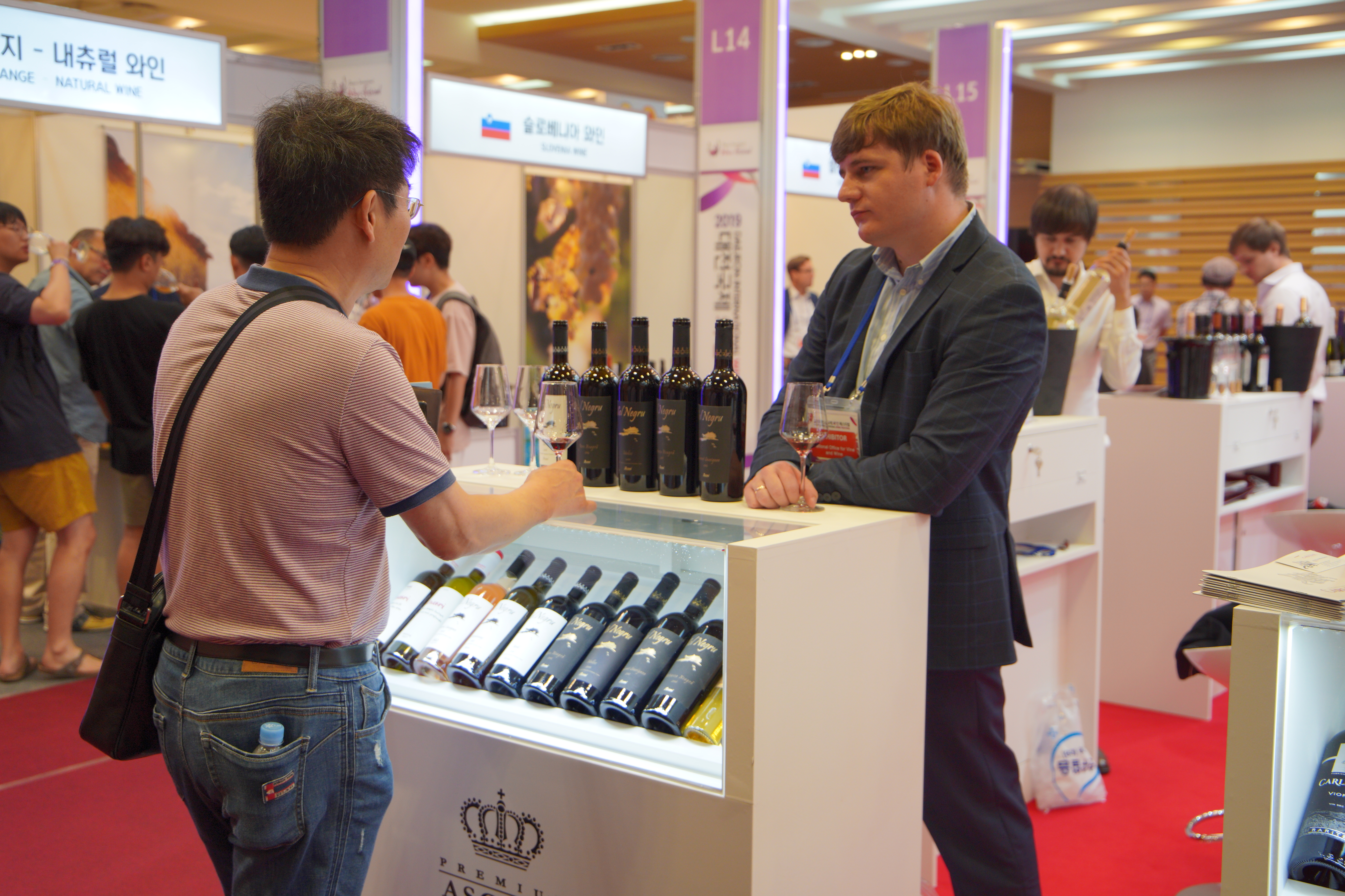 2019 대전국제와인페스티벌 (3)